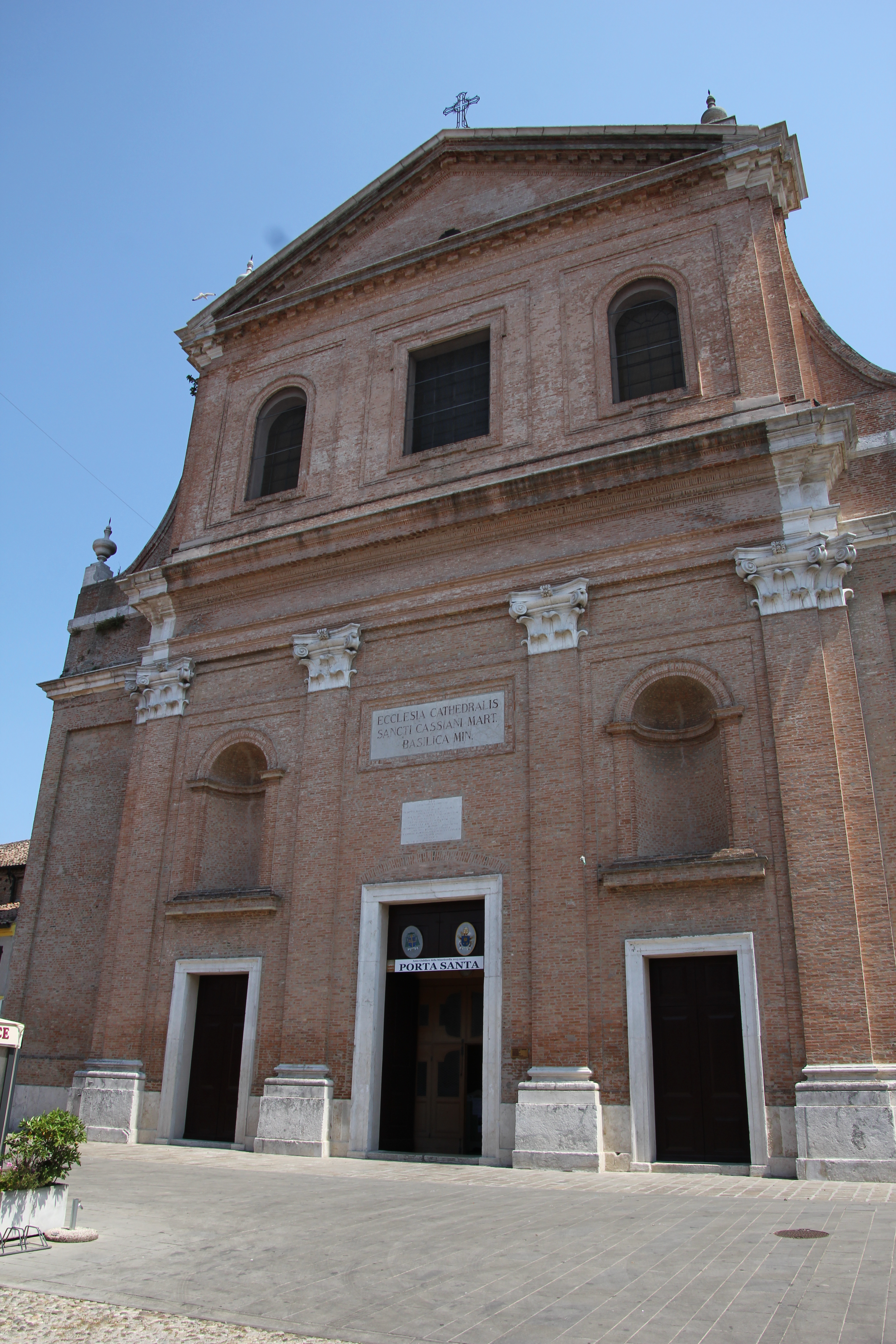 Comacchio, basilica di San Cassiano